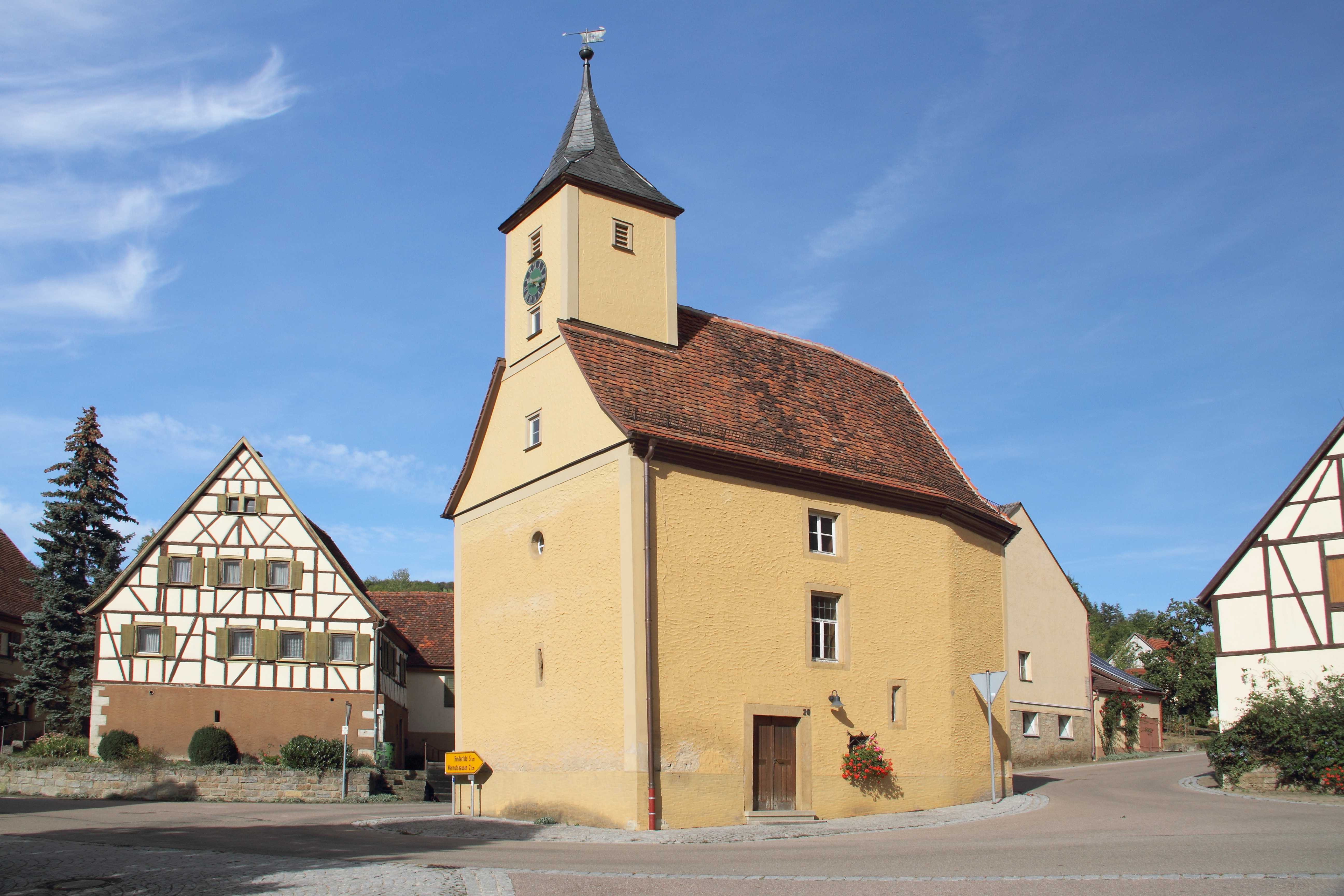 Die mittelalterliche Kapelle im Niederstettener Ortsteil Ebertsbronn.